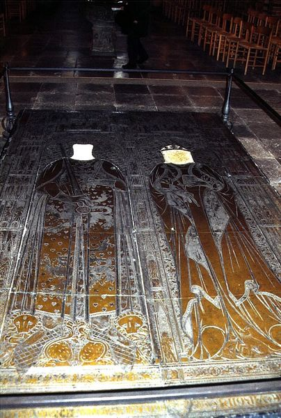 Ringsted Sankt Bendts Kirke i Danmark. Erik Menveds gravsten